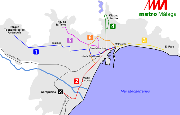 Proyecto del Metro de Málaga